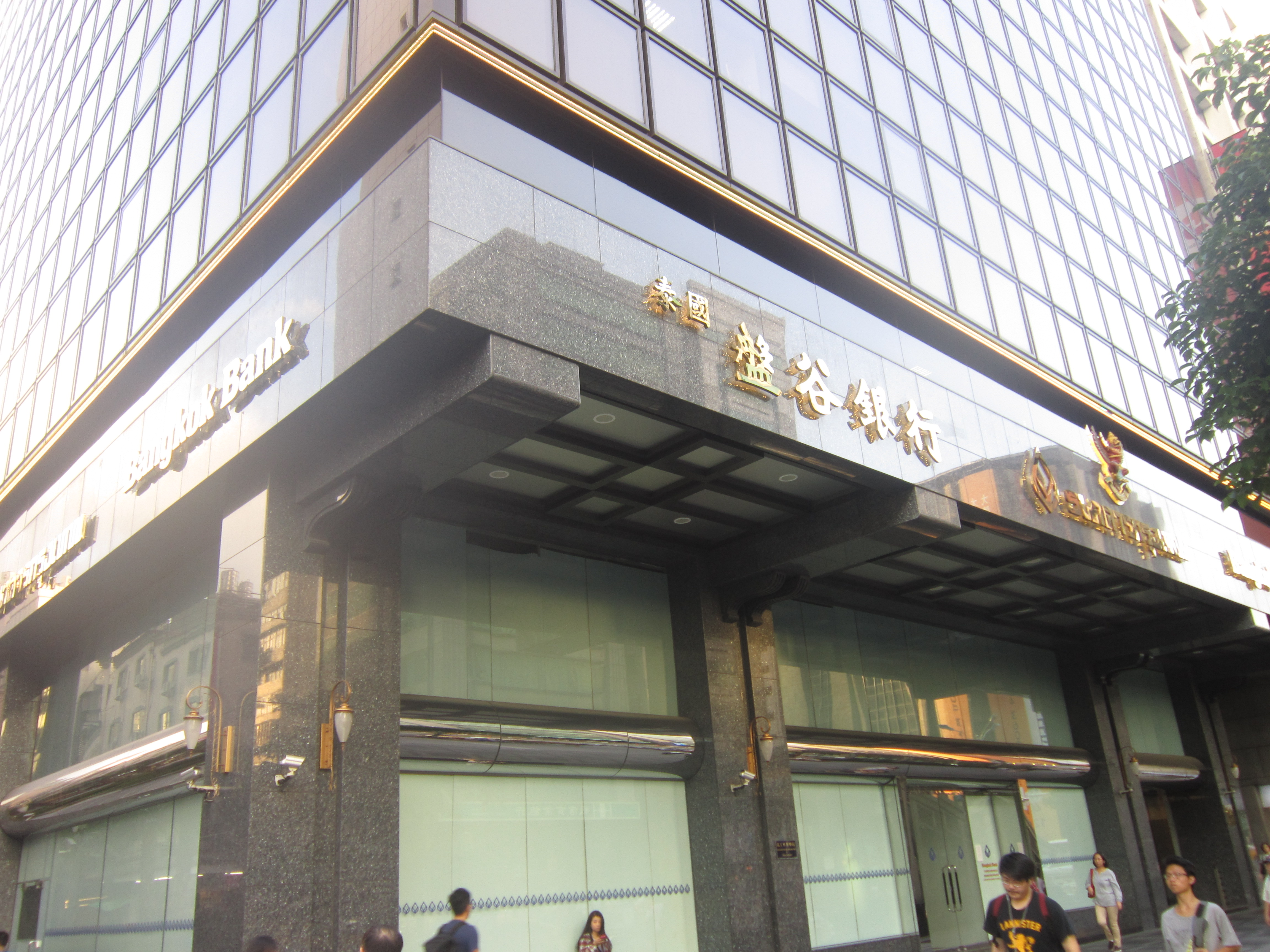 盤谷銀行台北分行，位於臺北市中山區松江路121號1樓（和泰汽車大樓）。